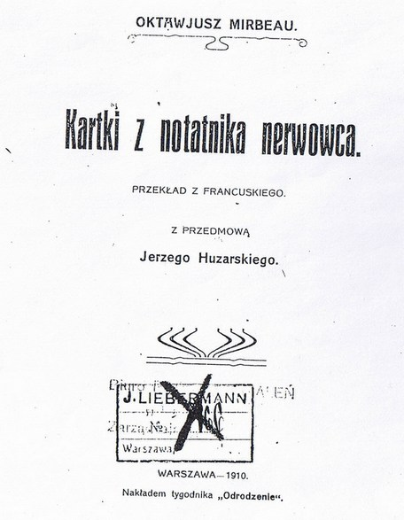 couverture de la traduction polonaise de Les 21 jours d'un neurasthénique, d'Octave Mirbeau (1848-1917)